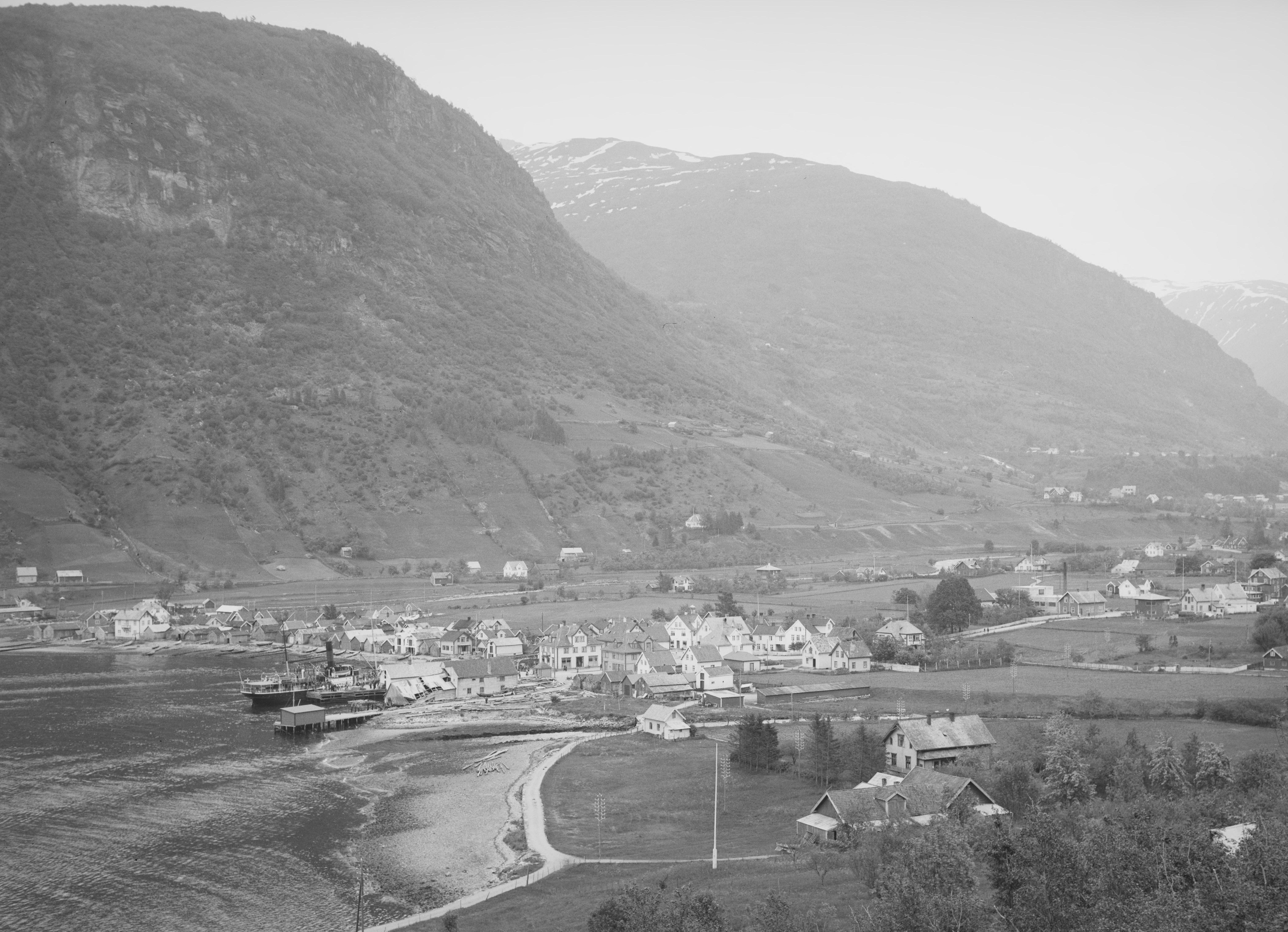 Bildet er hentet fra Nasjonalbibliotekets bildesamling. Anmerkninger til bildet var: Fotograf: Ukjent Vik, Vik, Sogn og Fjordane